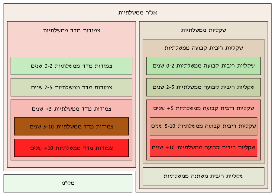 לפי יחס הכלה, צבועים לפי מח"מ